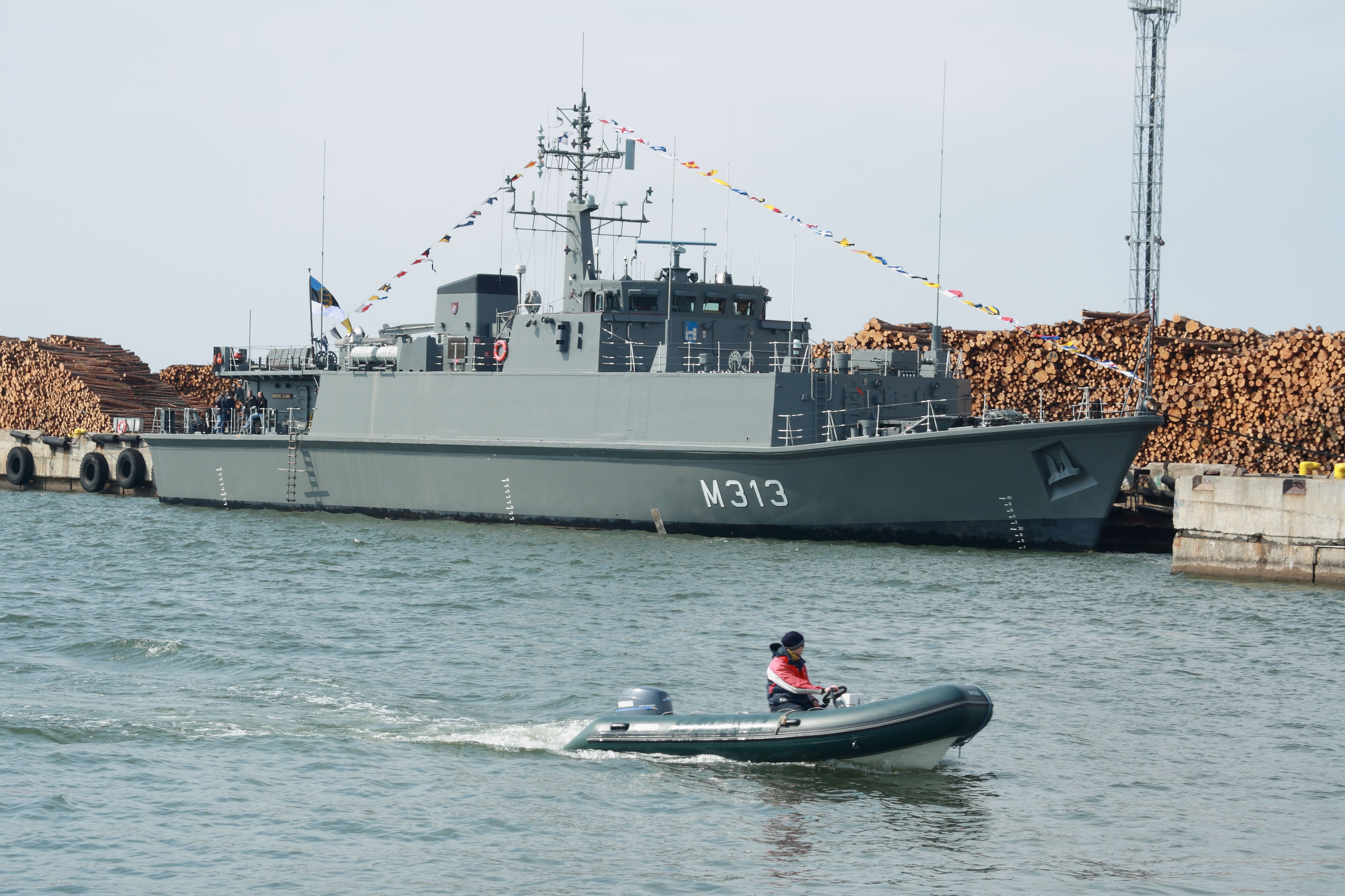 Admiral Cowan Roomassaare sadamas